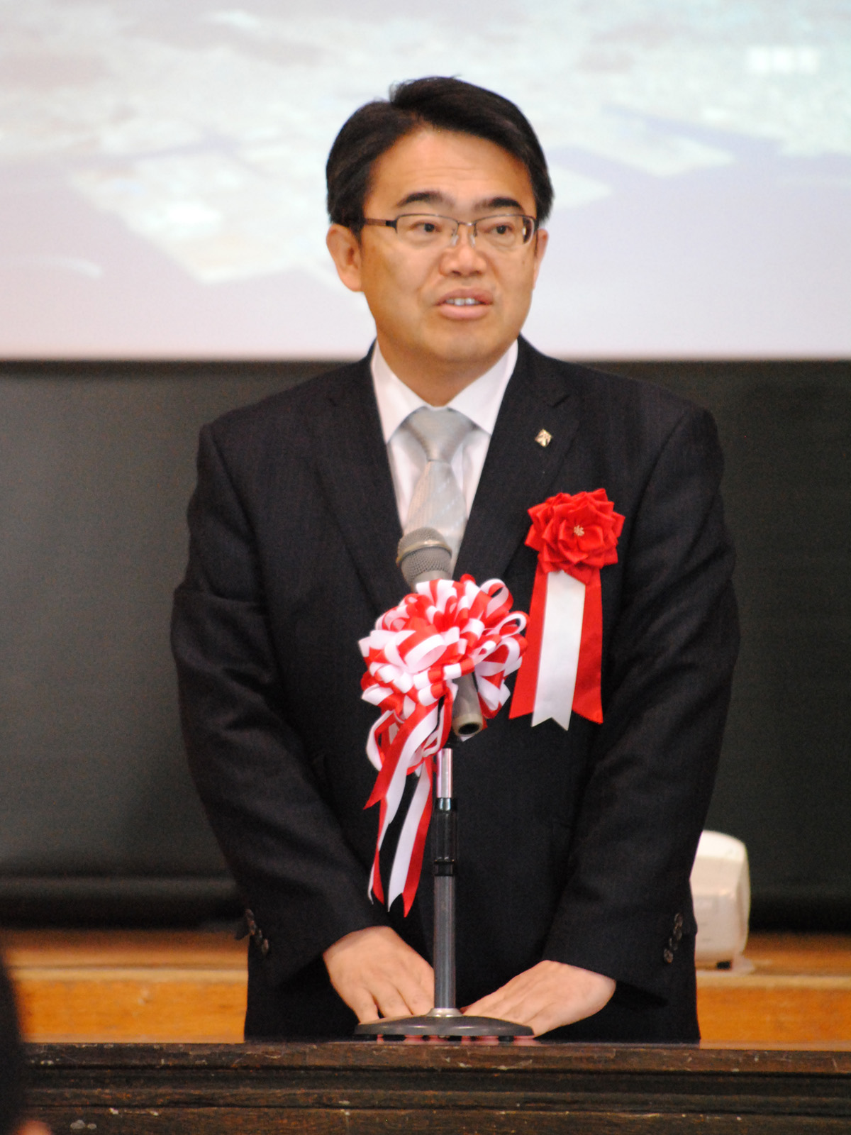 大村秀章。国道23号蒲郡バイパス（蒲郡IC～幸田芦谷IC）開通式典にて